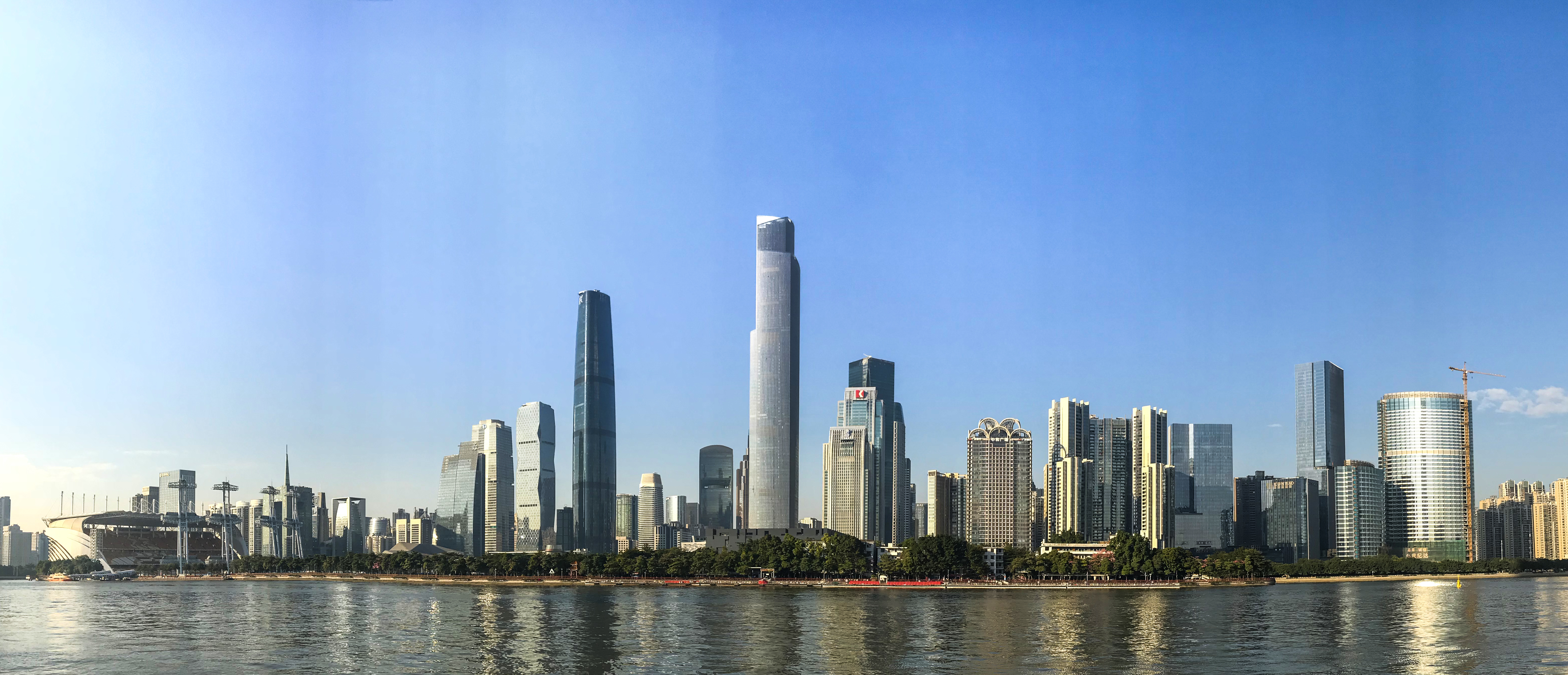 珠江新城的建筑群（摄于2017年12月）